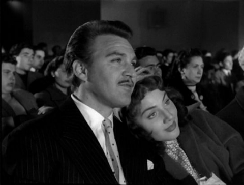 Screenshot del film I vitelloni (1953)